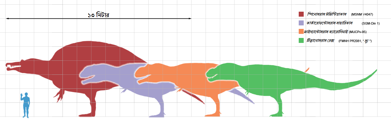 কয়েকটি নির্বাচিত বৃহৎ থেরোপড ডাইনোসর ও একজন মানুষের গড় আয়তনের তুলনামূলক চিত্র